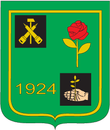 Герб Жданівки 2000-2006рр.